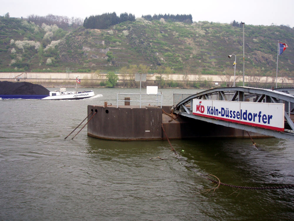 Anleger an den Rheinanlagen in Andernach